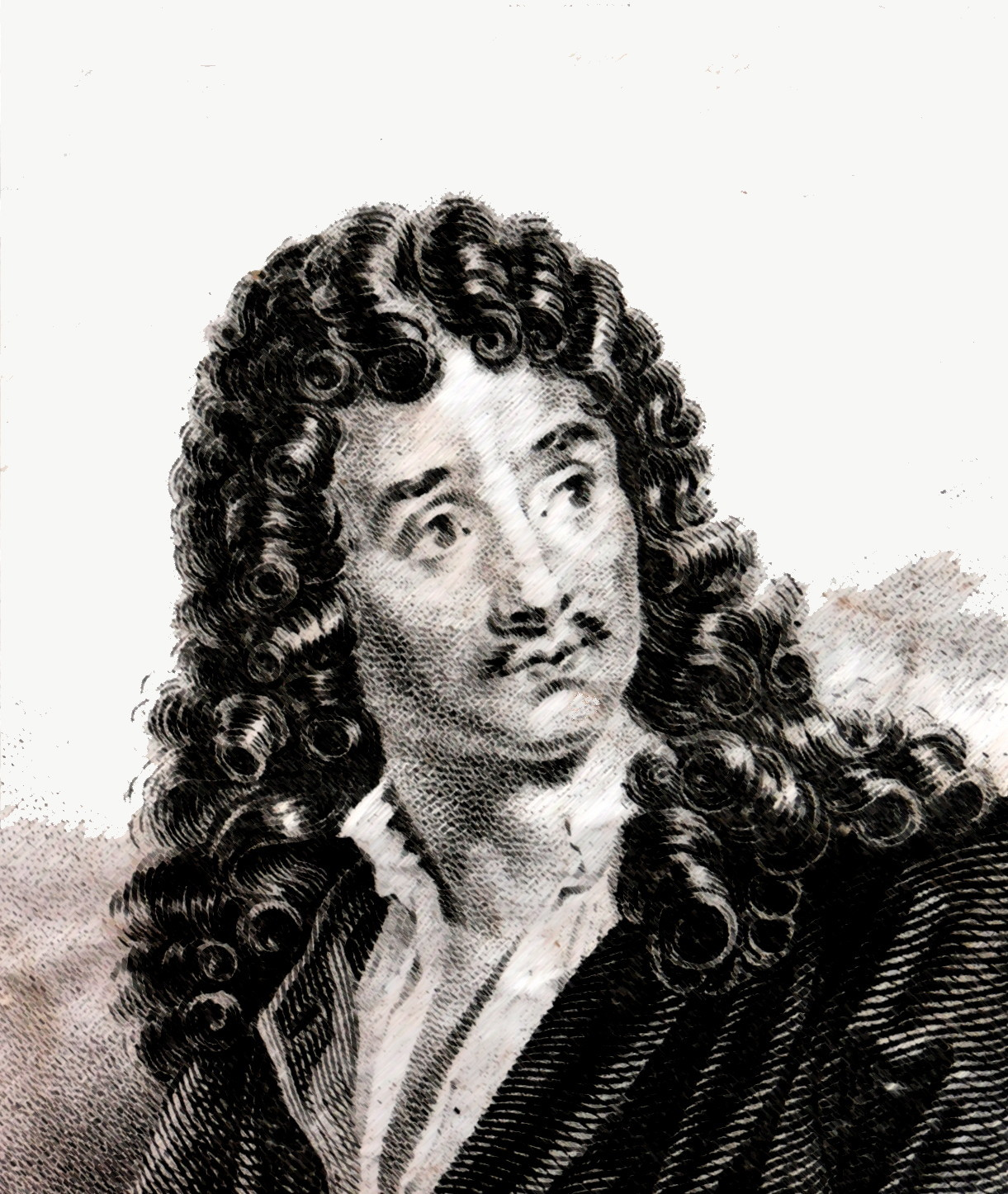 Frontispice d'une édition de 1840 : « Théâtre français - Œuvres de Molière », Éditeurs Martial Ardant frères. Auteurs de la photographie : Jodelet/Lépinay.